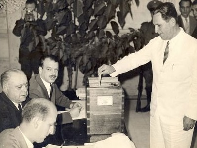 Perón votando en 1946